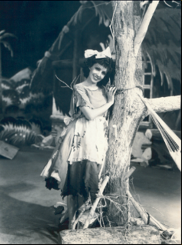 Gilda de Abreu (Paris, 23 de setembro de 1904 — Rio de Janeiro, 4 de junho de 1979) foi uma cineasta, atriz, cantora, escritora e radialista brasileira